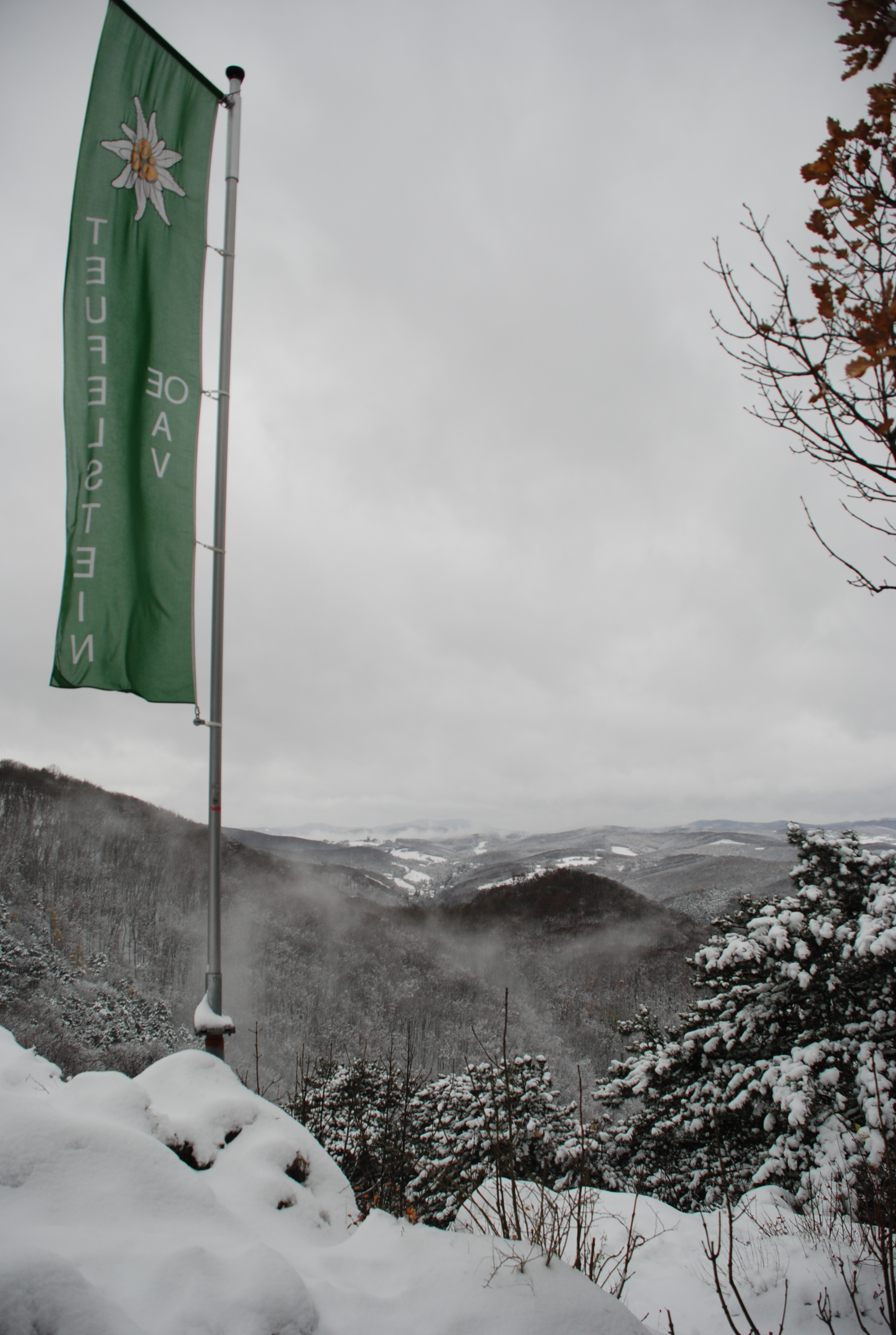 Vom Teufelstein nach Westen. Winterstimmung